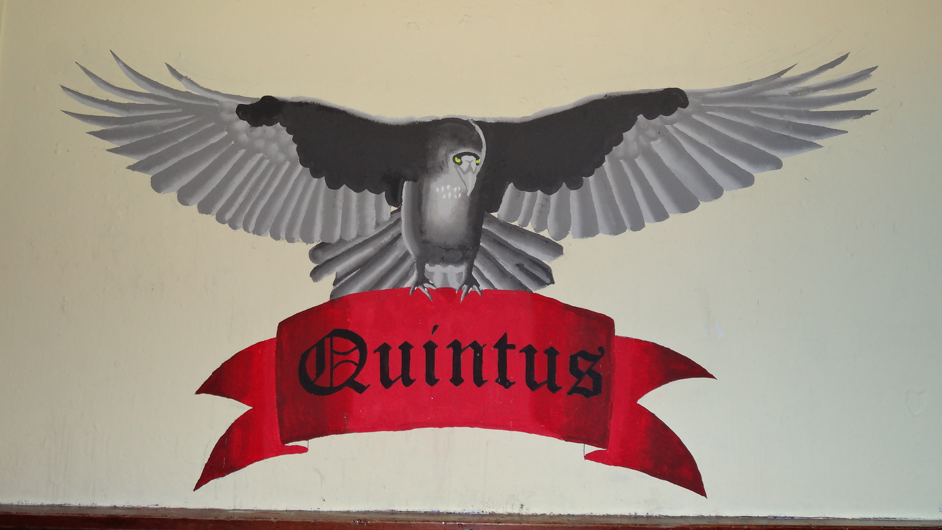 ALSV QUINTUS muurschildering raevenzaal